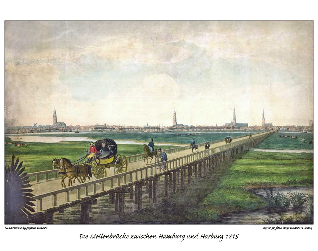 Die Meilenbrücke zwischen Hamburg und Harburg 1815, gezeichnet von Christoffer Suhr, Litho von Peter Suhr